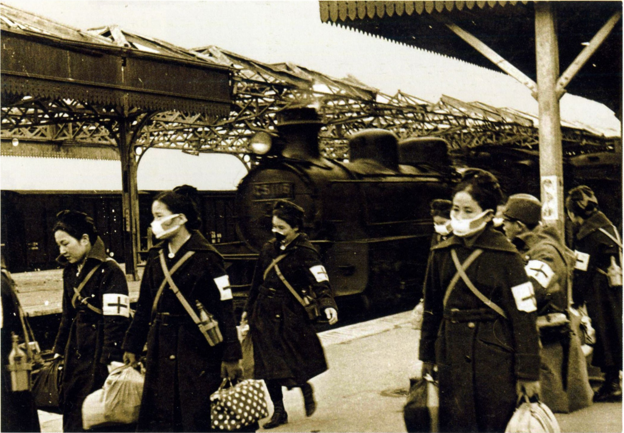 華中鉄道でのC51 116と、前線に向かう看護婦。蘇州駅(中国・江蘇省）にて。本機を含む国鉄C51形蒸気機関車16輌が1939年に華中鉄道に供出された。